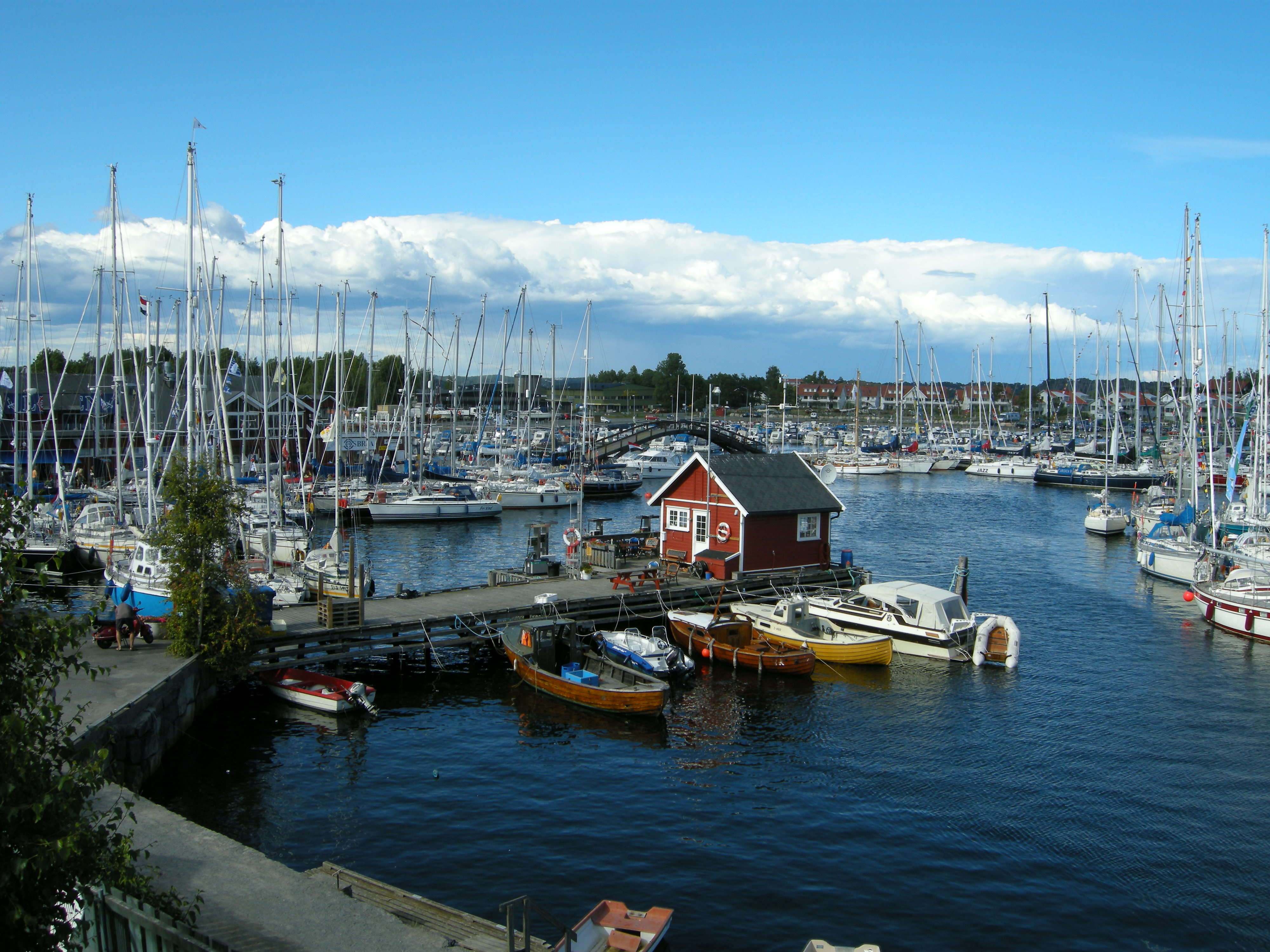 Seilbåter i Stavern havn